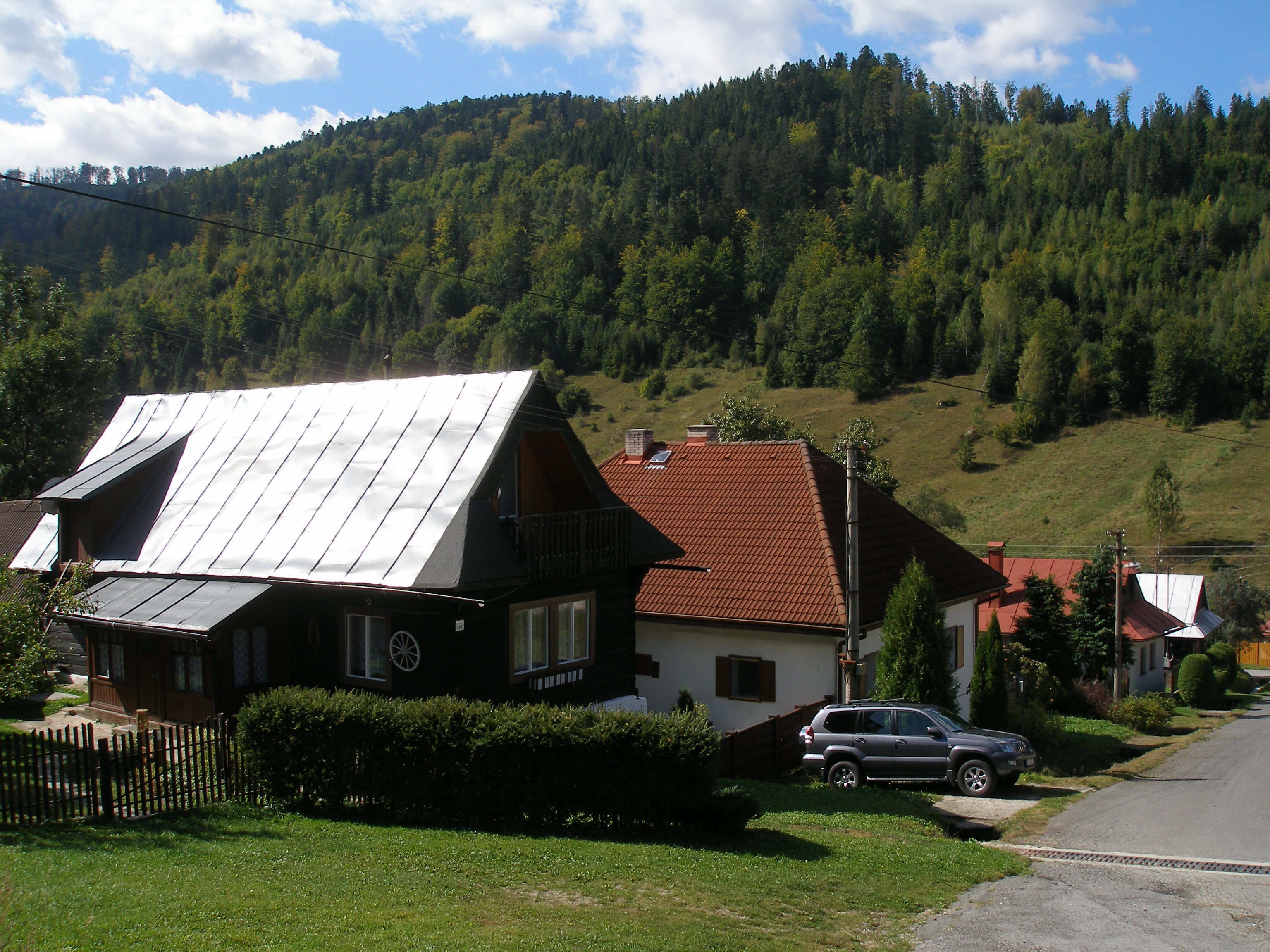 Spišská obec Henclová okres Gelnica.